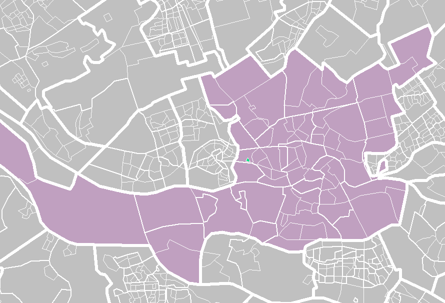 Rotterdam districts/neighboorhoods